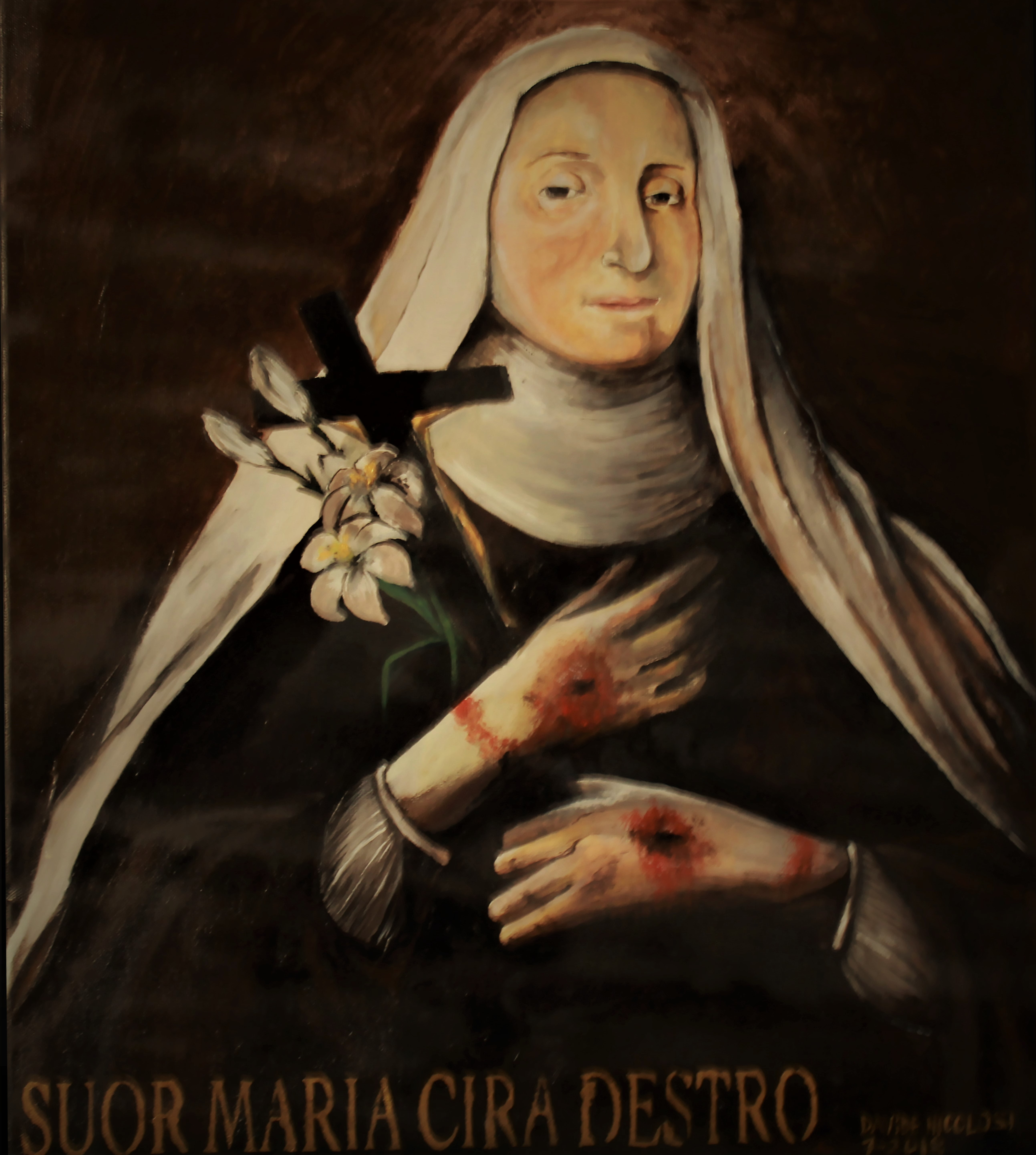 Ritratto di Suor Maria Cira Destro, mistica corleonese morta nel 1818 in fama di santità. Acrilico su tela di Davide Nicolosi, 2018